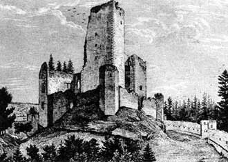 obrázek z Landštejn na rytině J. Richtera z r. 1847